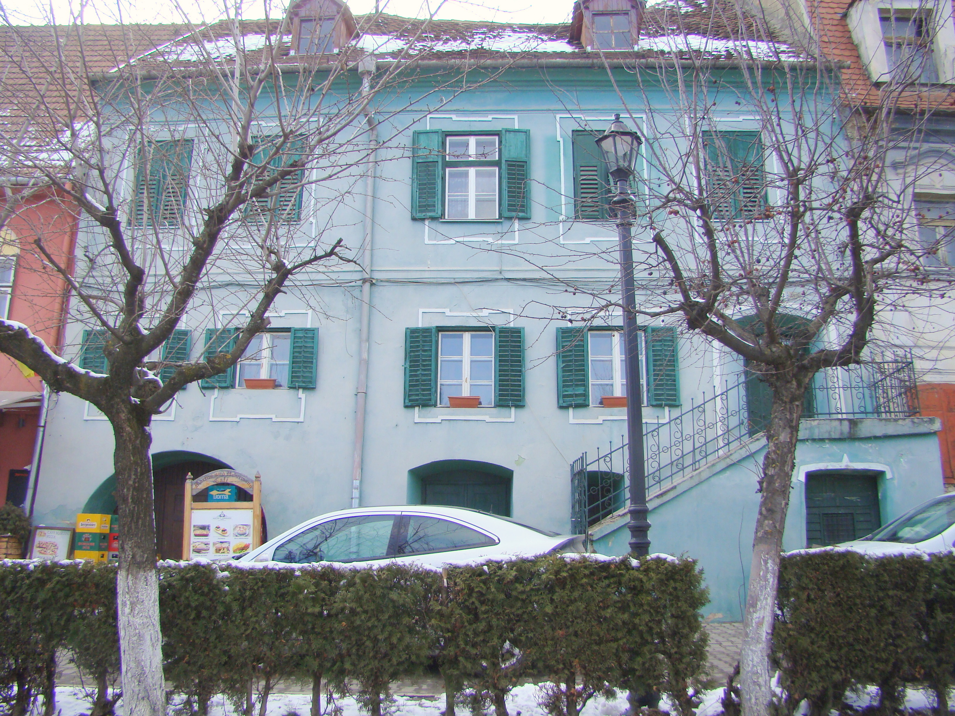 Casa Jacobi, municipiul Sighișoara, Piața Oberth Hermann 43 sec. XVII,1876